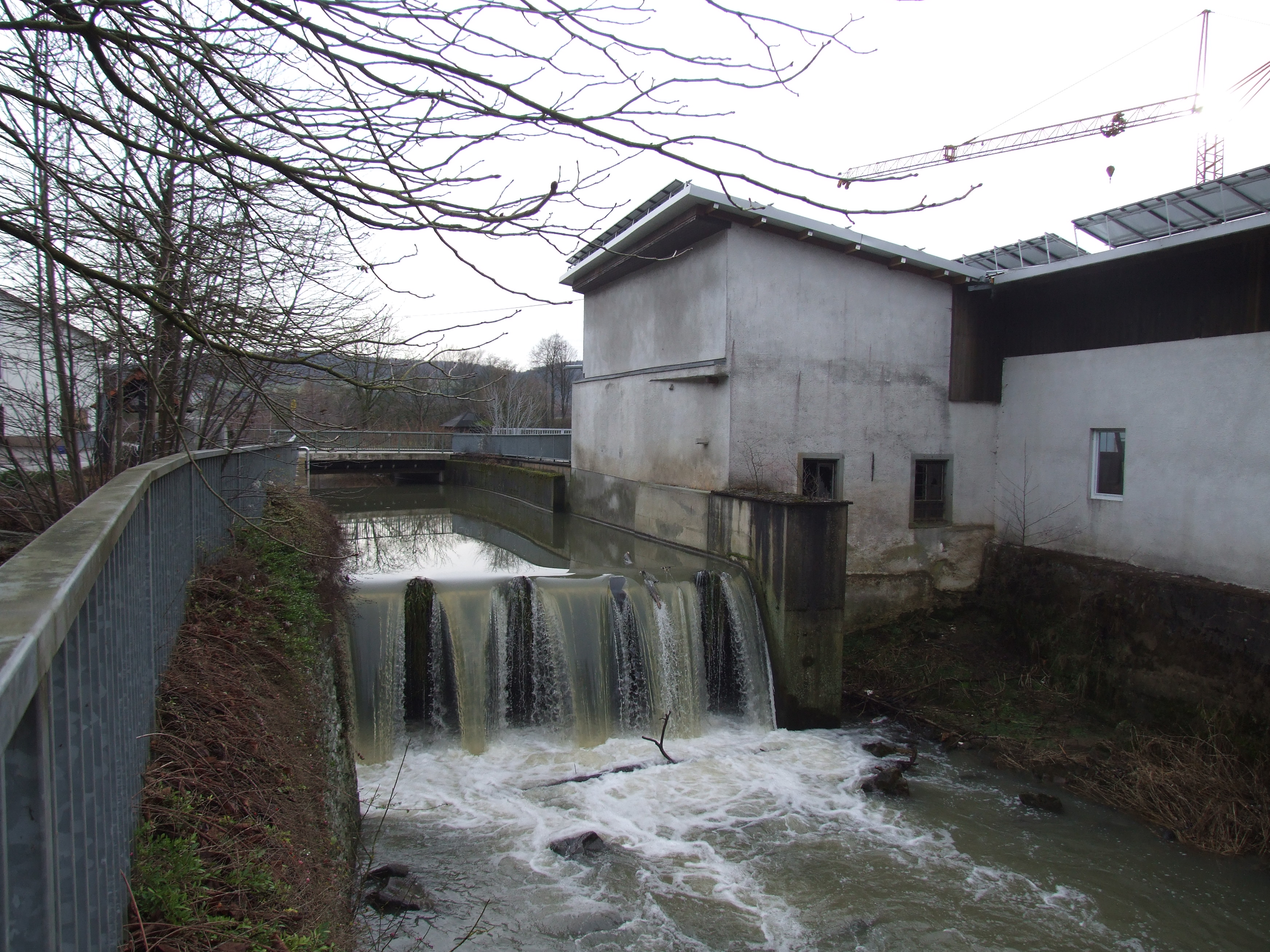 Schwarzbach, Wasserfall in Eschelbronn